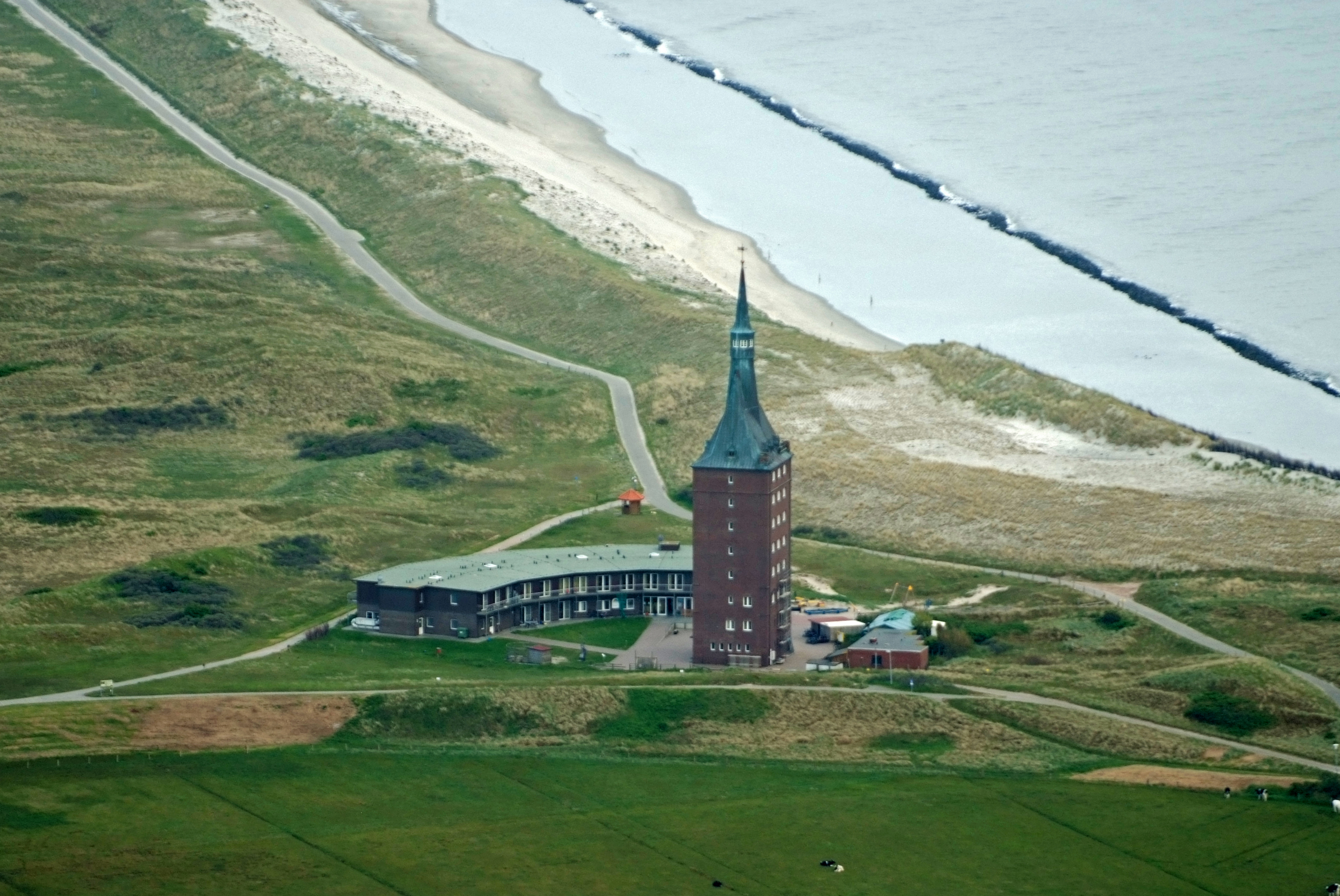 Fotoflug vom Flugplatz Nordholz-Spieka über Bremerhaven, Wilhelmshaven und die Ostfriesischen Inseln bis Borkum Wangerooge: neuer Westturm mit Jugendherberge